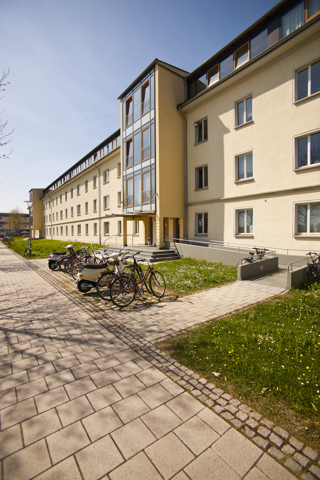 Philosophische Fakultät der Universität Erfurt